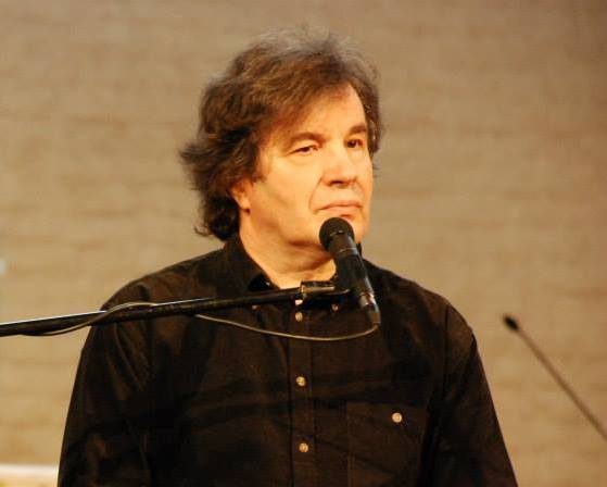 Kontsert Tartu Jaani kirikus 8.mail 2014.a.